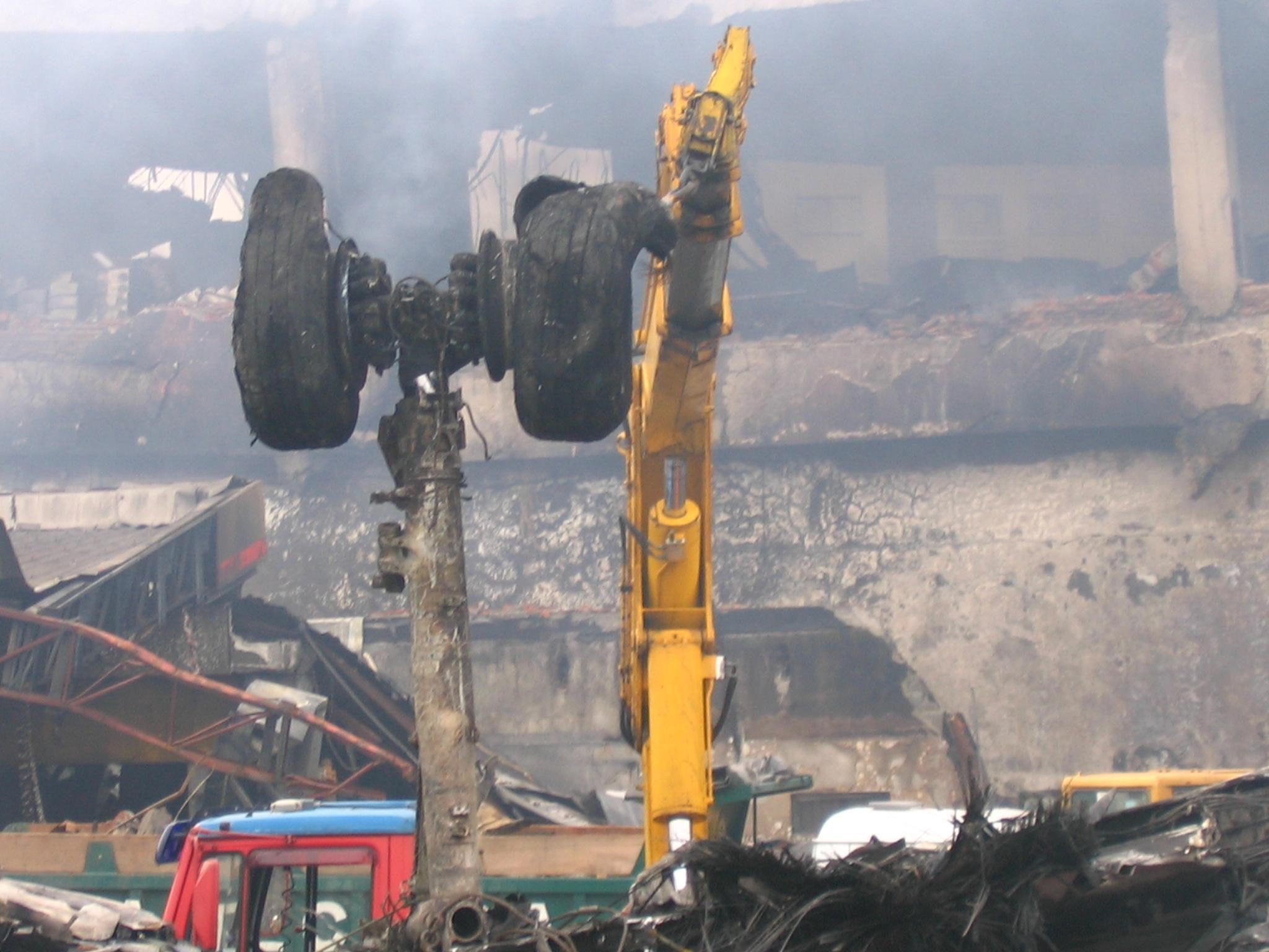 Destroços da aeronave.